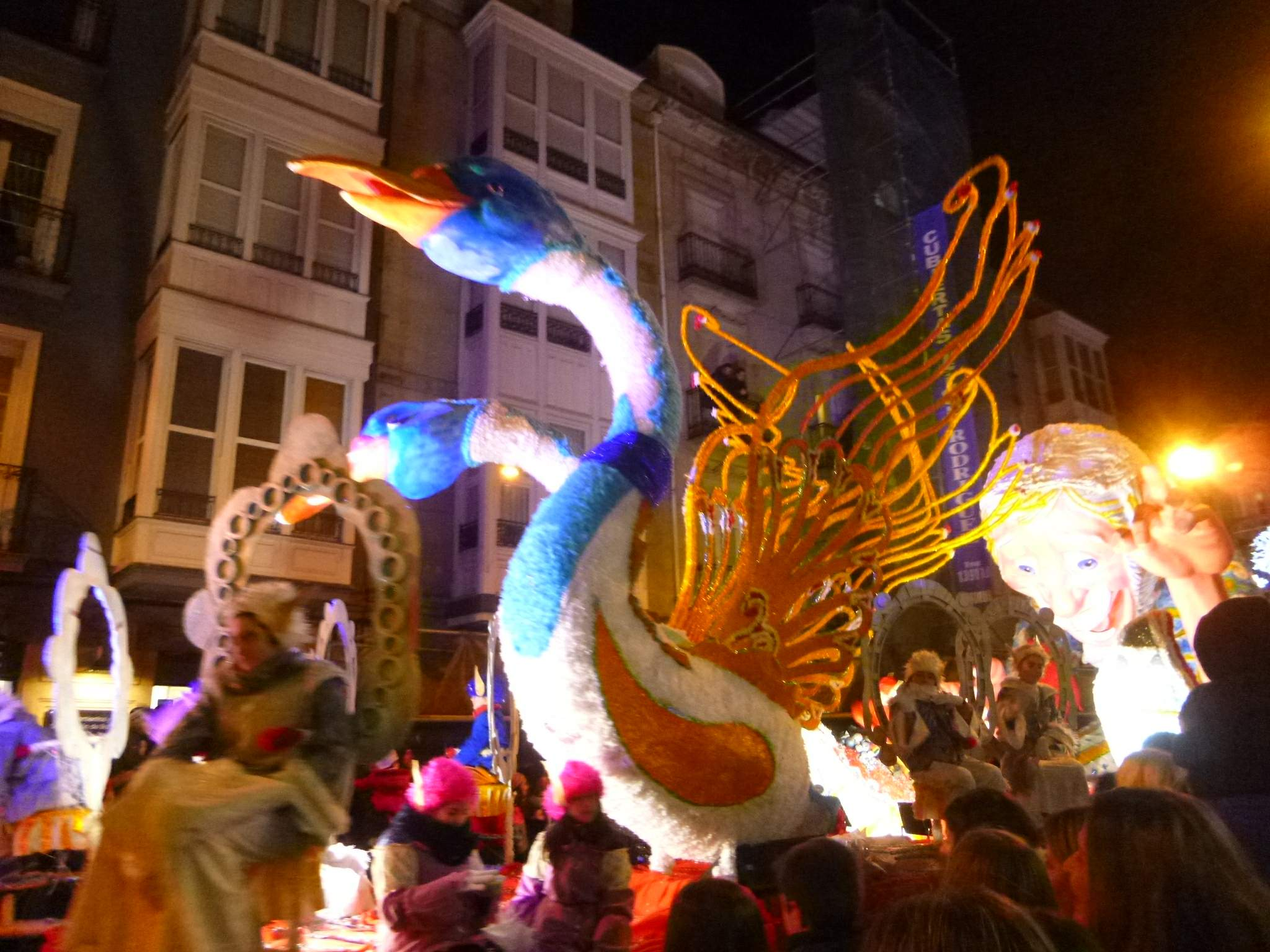 Cabalgata de los Reyes Magos en Vitoria-Gasteiz, 5 e enero de 2017